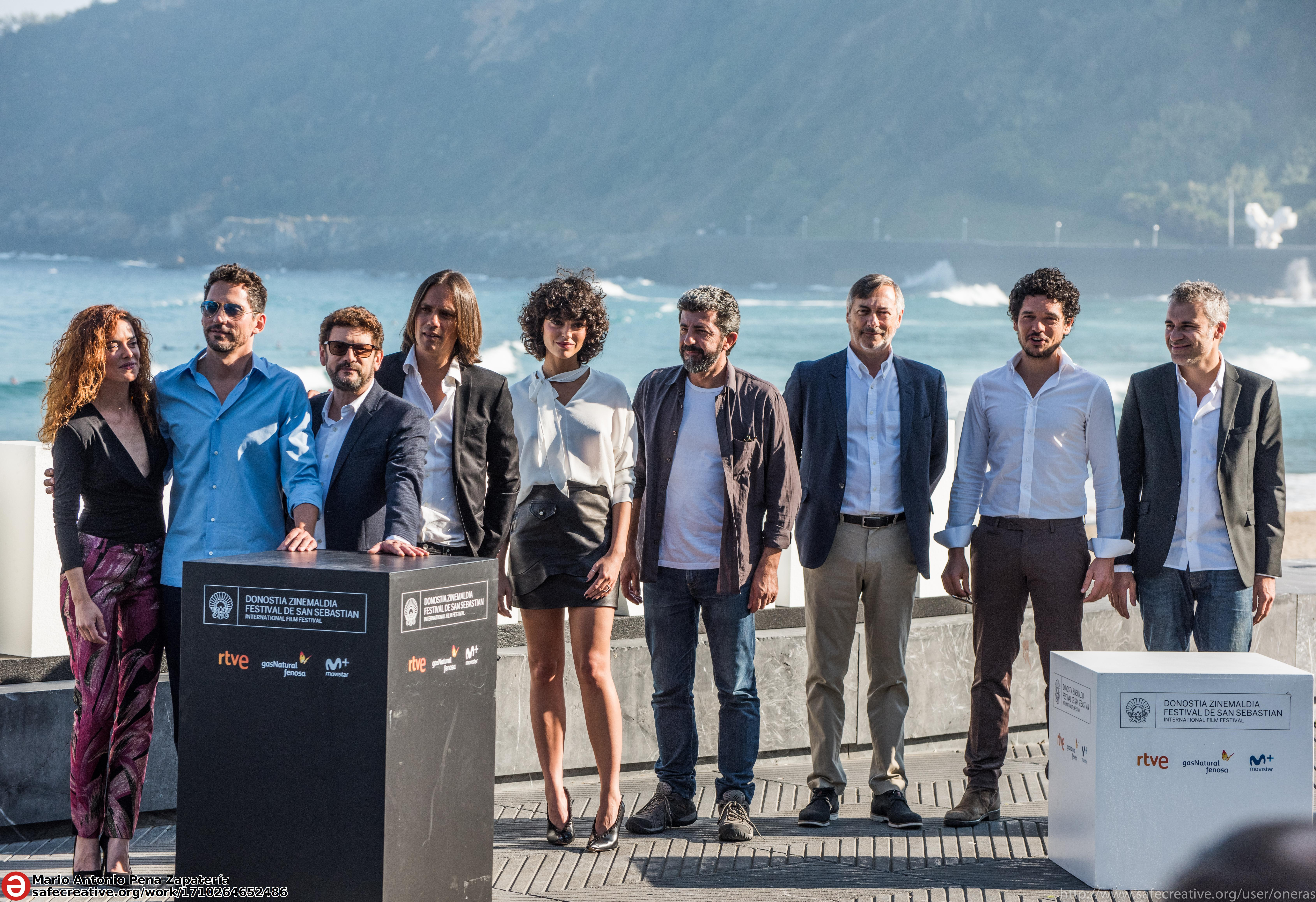 Equipo de la serie La peste, durante el festival de San Sebastián de 2017.